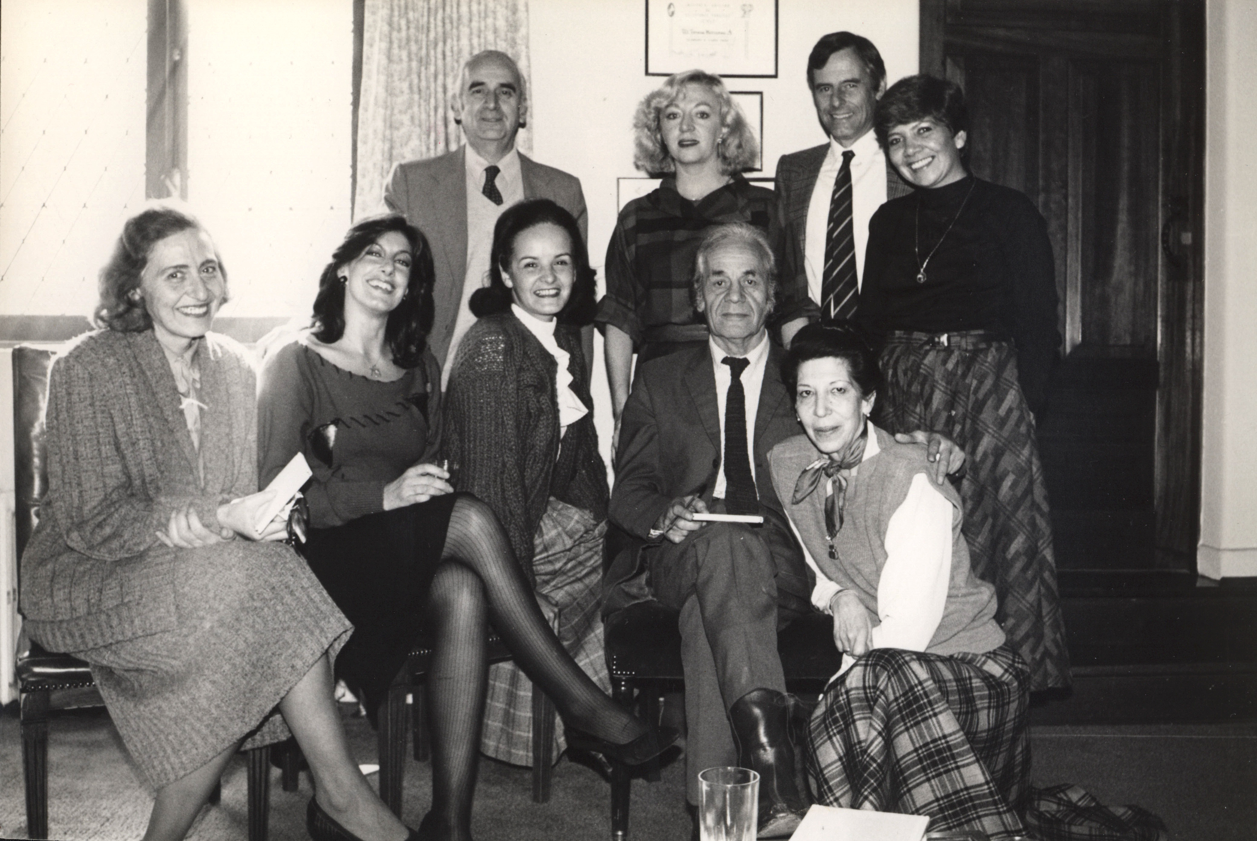 Nicanor Parra y visitantes, entre ellos políticos.